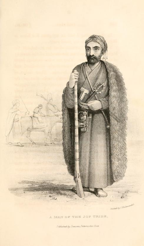 Retrato de un miembro de la tribu Jaf.